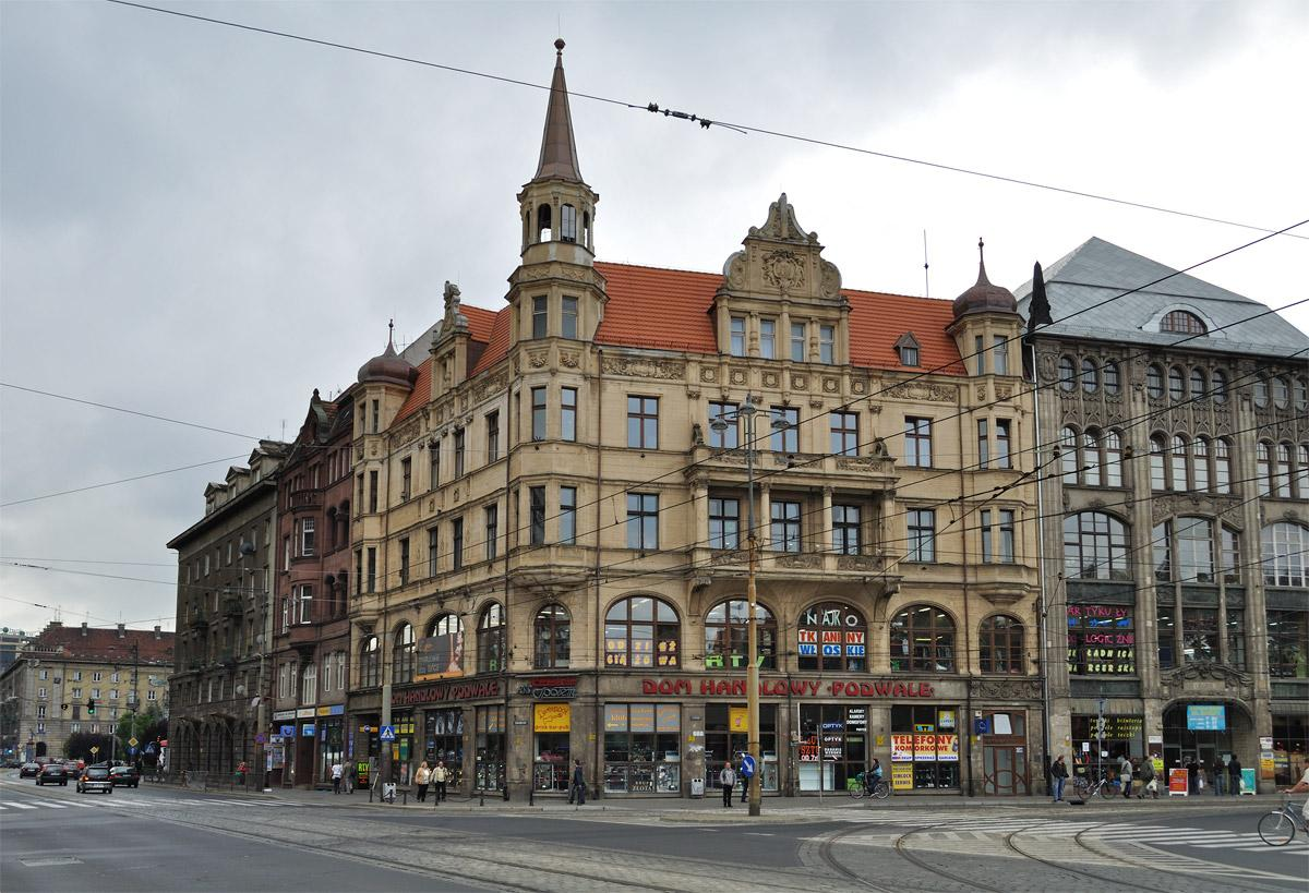 Dom handlowy "Podwale".